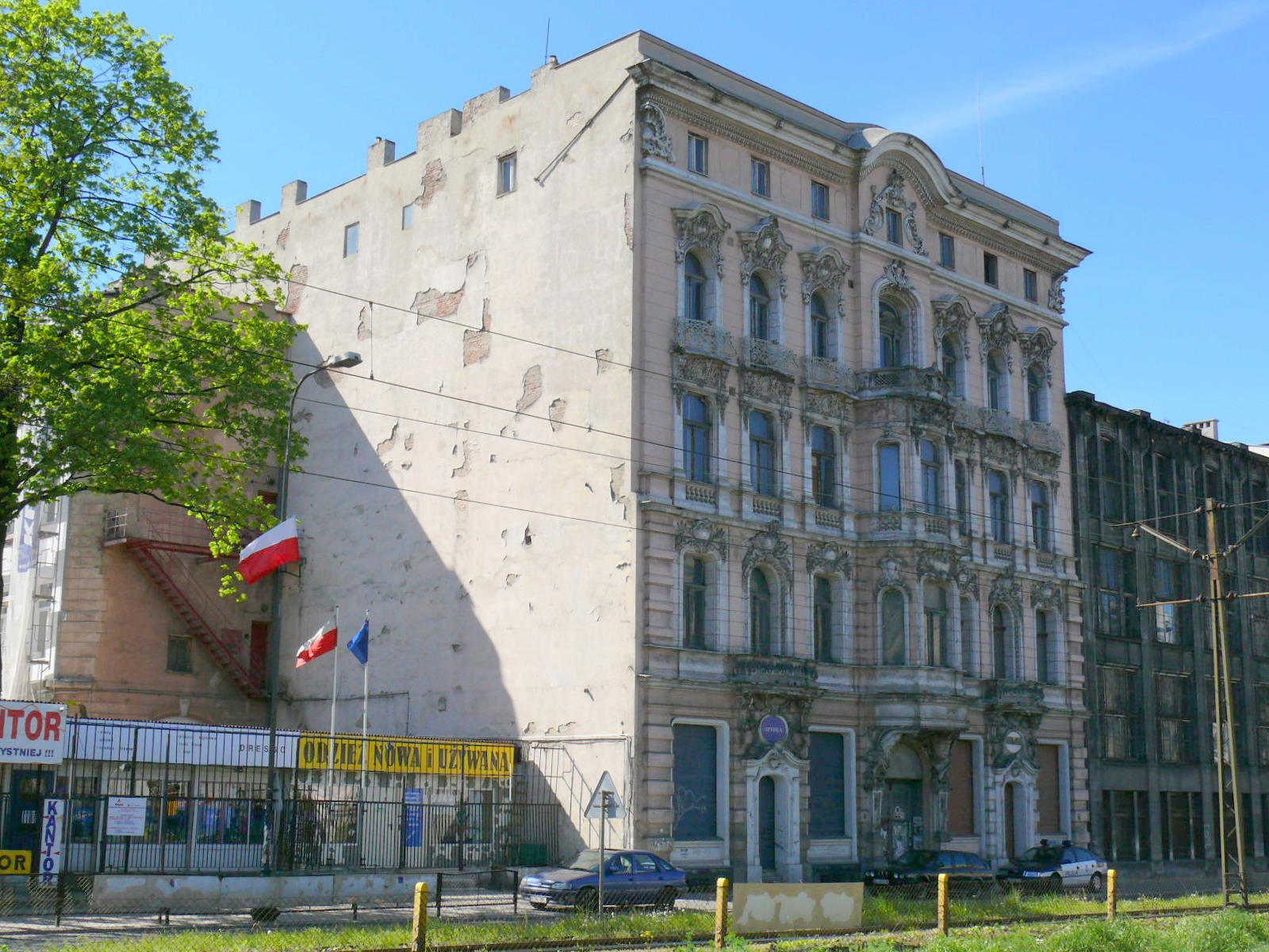 Kamienica przy al. Kościuszki 21 w Łodzi